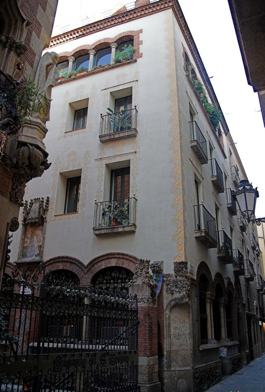 Casa Carreras (Barcelona-Catalunya), obra de Josep Puig i Cadafalch 1920. C/Montsió 5. Vista general.